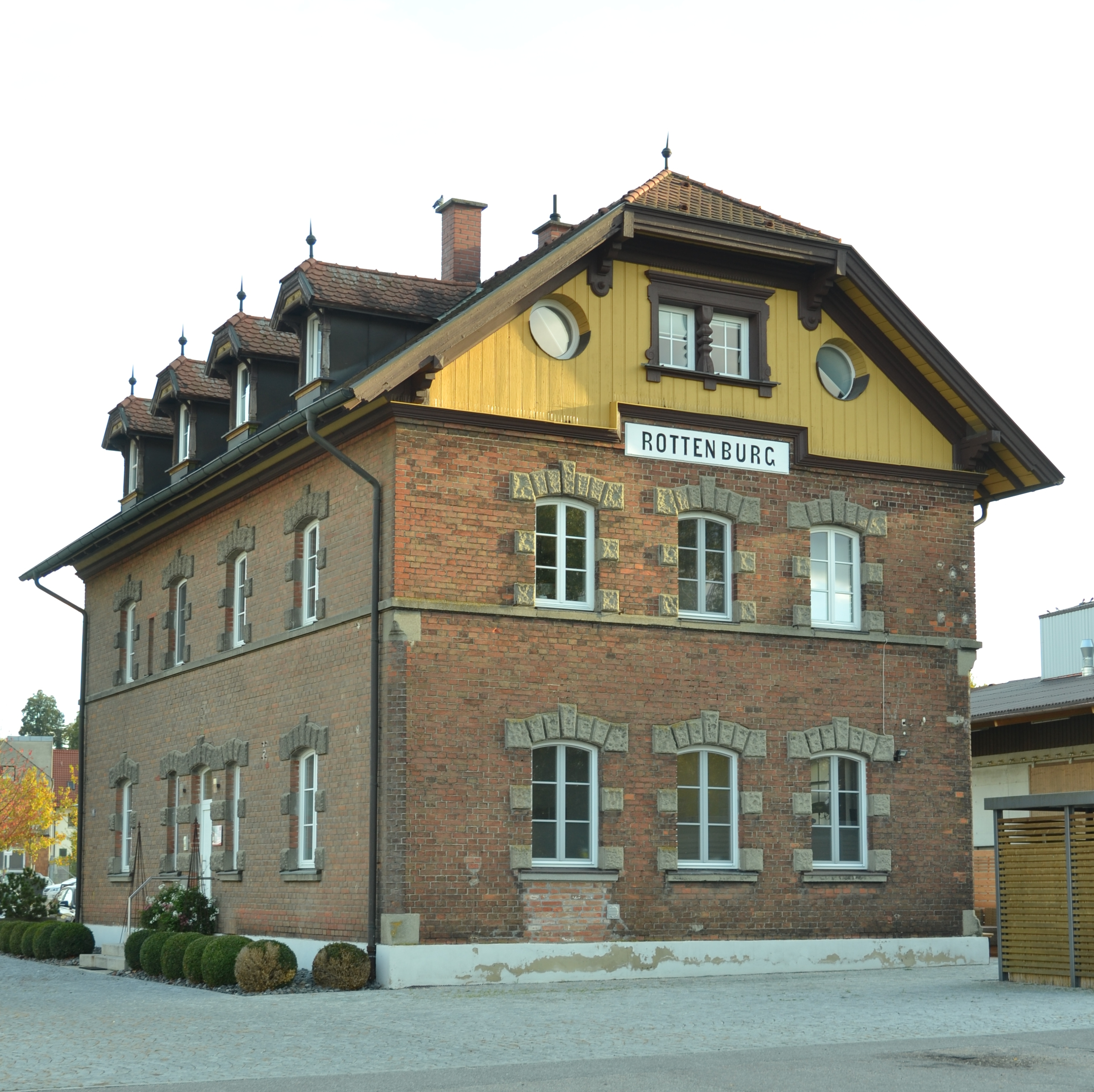 Rottenburg a. d. Laaber, Empfangsgebäude